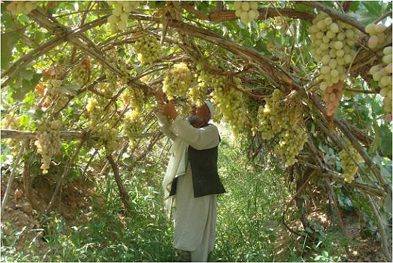 Tunnel Pergola Afghanistan